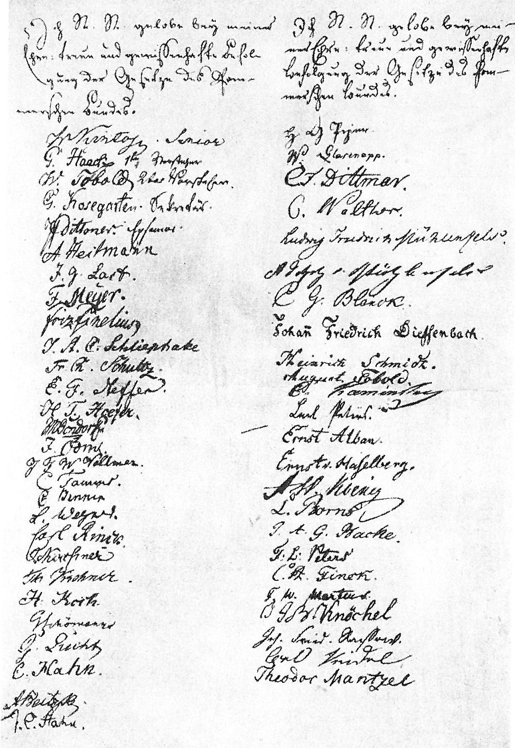 Erste Namensliste des Pommerschen Bundes, letztes Blatt der Gesetze des Bundes von 1811. Die linke Reihe geht bis zum 8. Mai 1812, die rechte Spalte bis 1815